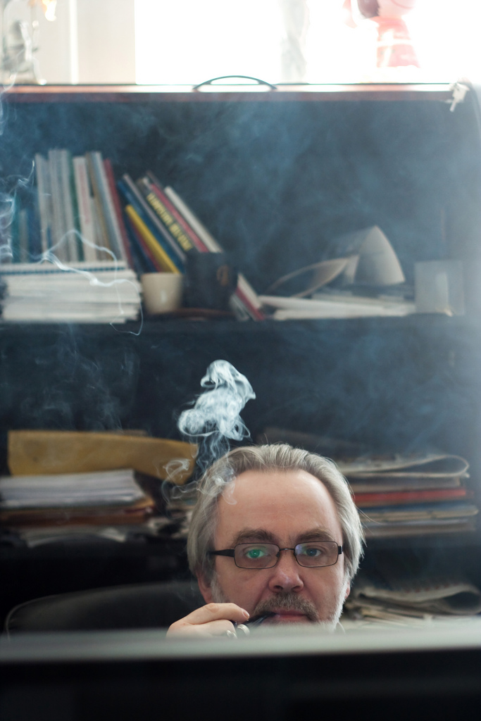 Arheoloog Valter Lang Tartus, Lossi tn 3 õppehoones.